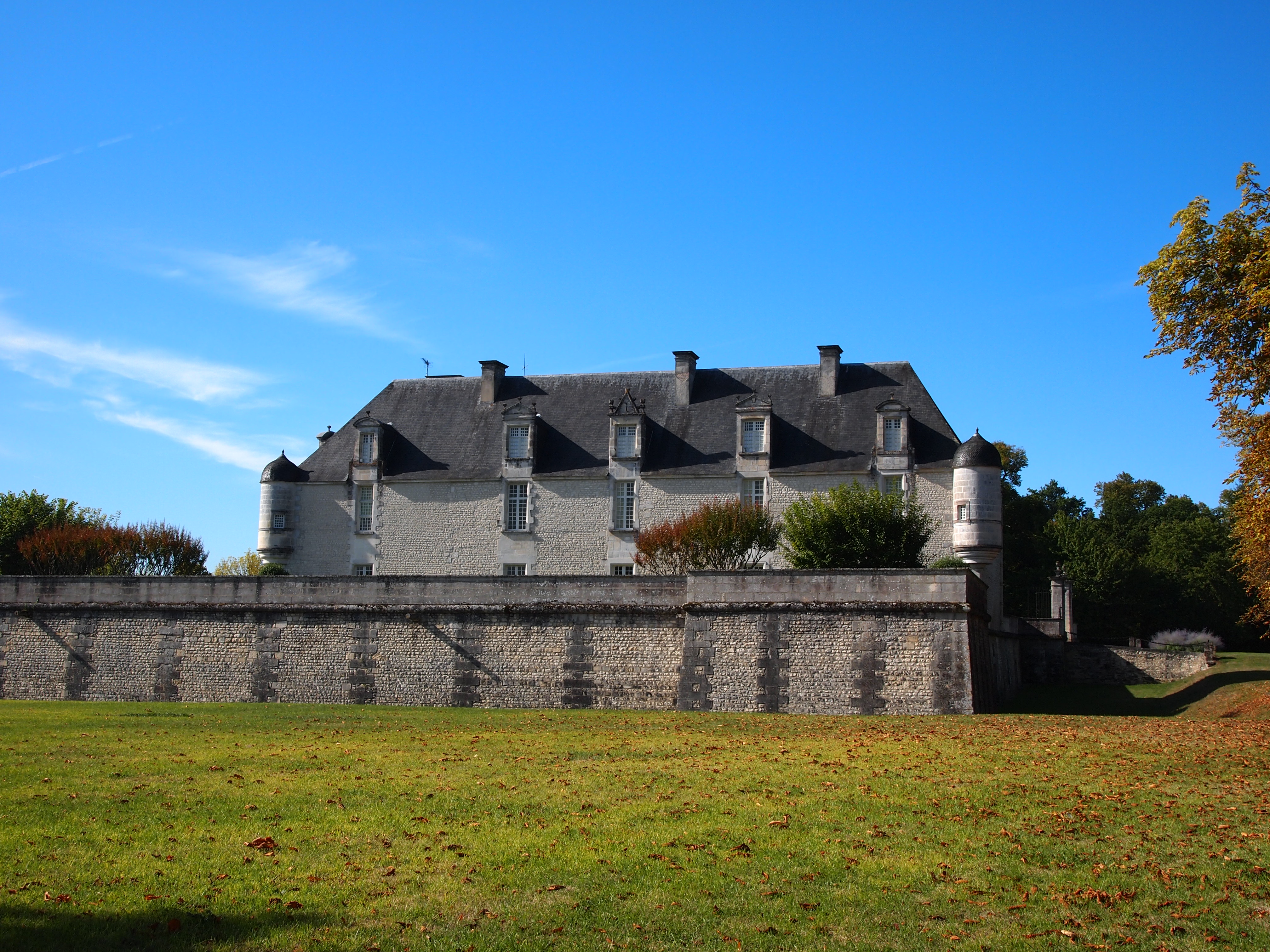 château d'Ars monument historique à Ars en Charente